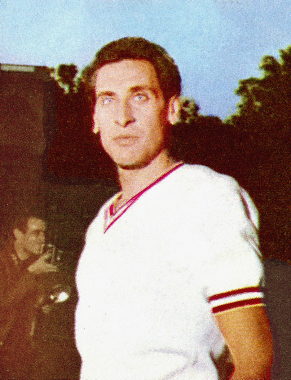 CAMPIONI DELLO SPORT 1966/67 - Figurina/Sticker n. 32 - G. CORNACCHIA -Rec